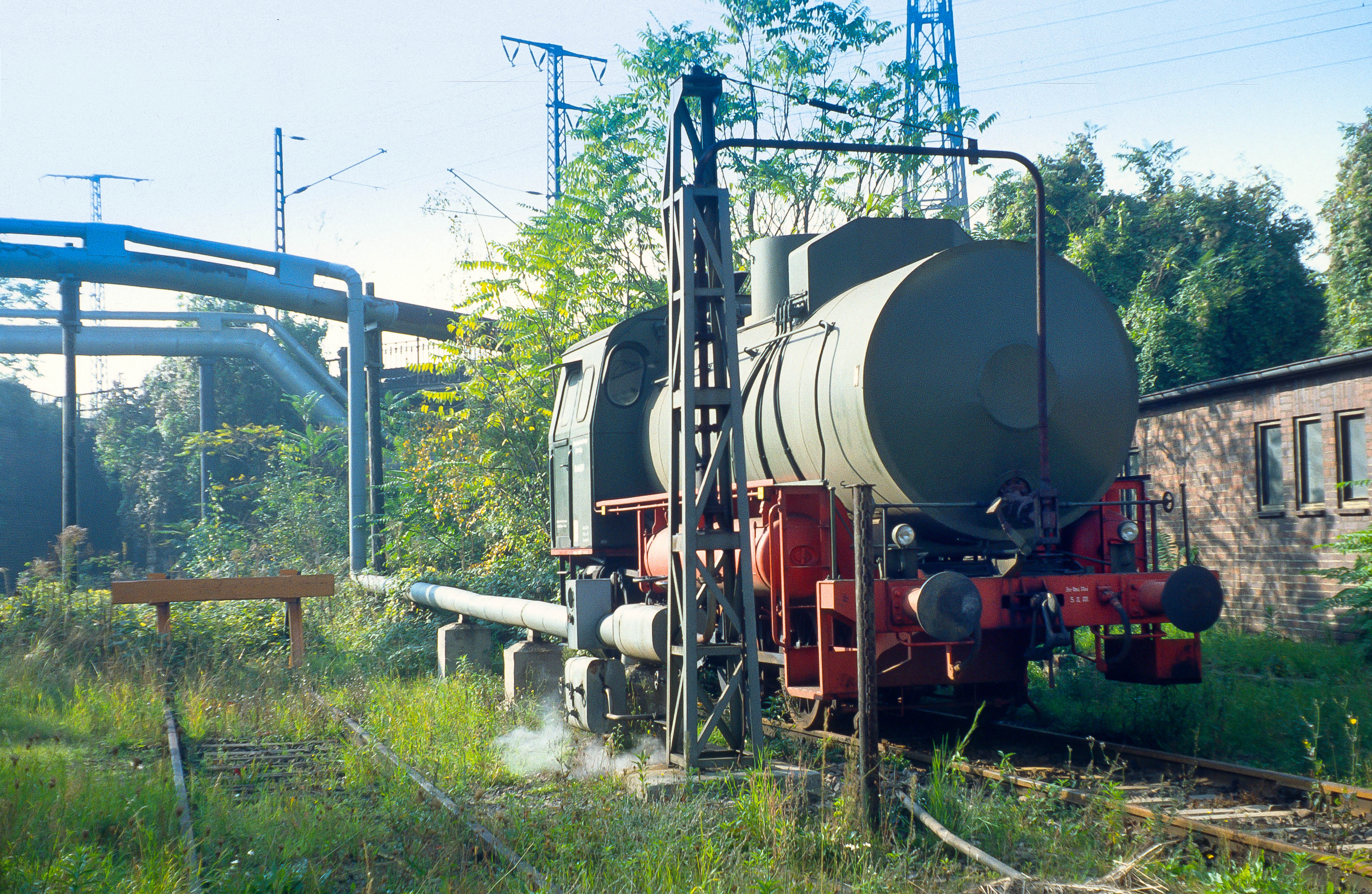 Dampfspeicherlok am Kraftwerk Mitte